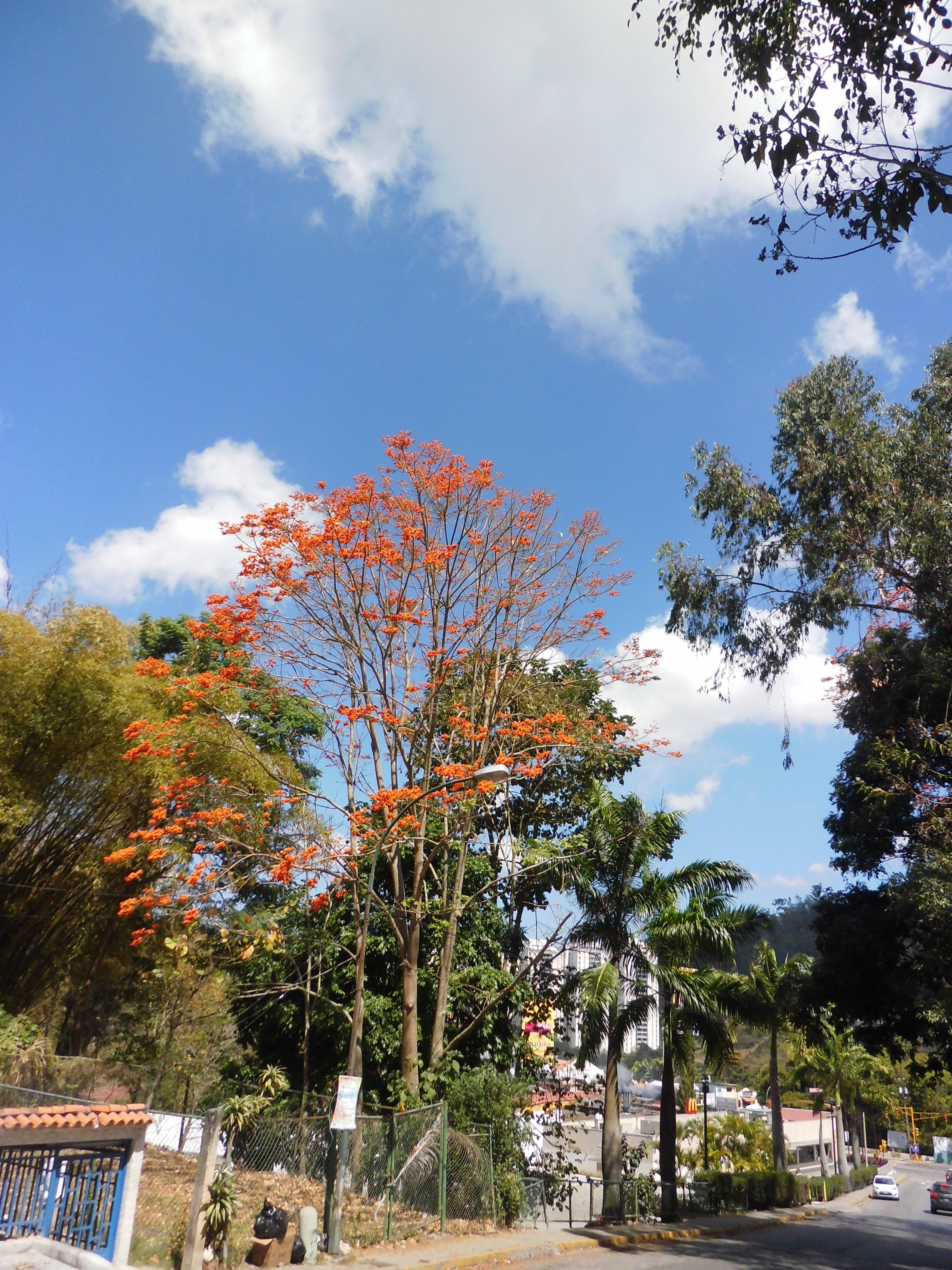 Erythrina poeppigiana (Walp.) O.F.Cook localizado a la entrada de Los Pinos 2 en el municipio El Hatillo, estado Miranda - Venezuela